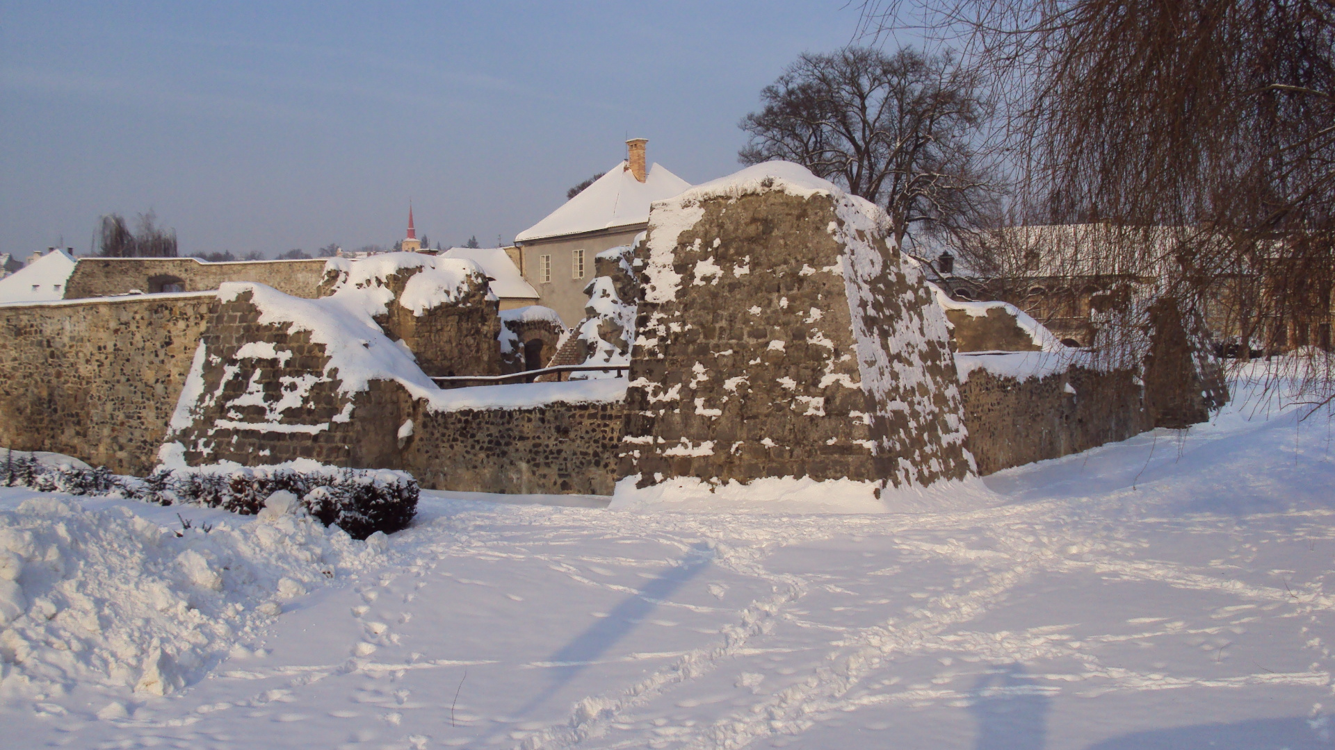 Česky: Zbytky vodního hradu Lipý v České Lípě